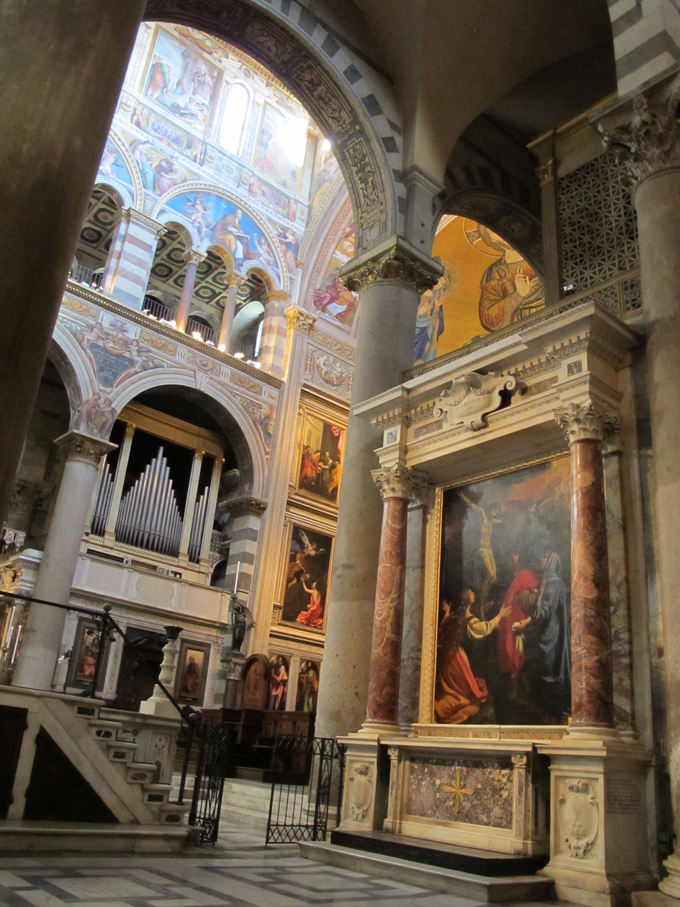 pisa, il duomo